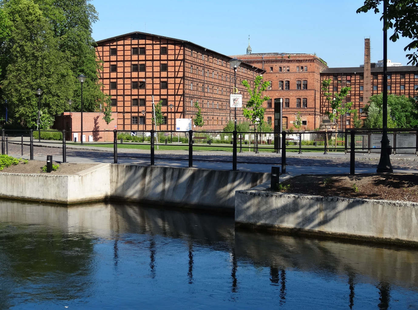 Młyny Rothera (zbud. 1850 r.) na Wyspie Młyńskiej w Bydgoszczy